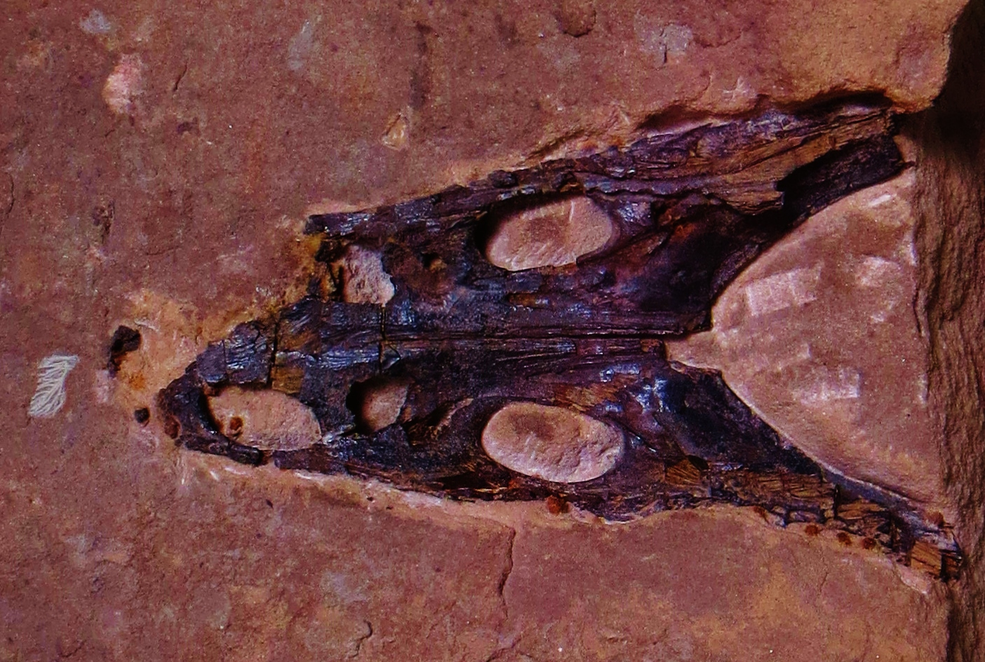 Fossil of Trematosaurus, an extinct amphibian- Took the photo at Musee d'Histoire Naturelle, Paris